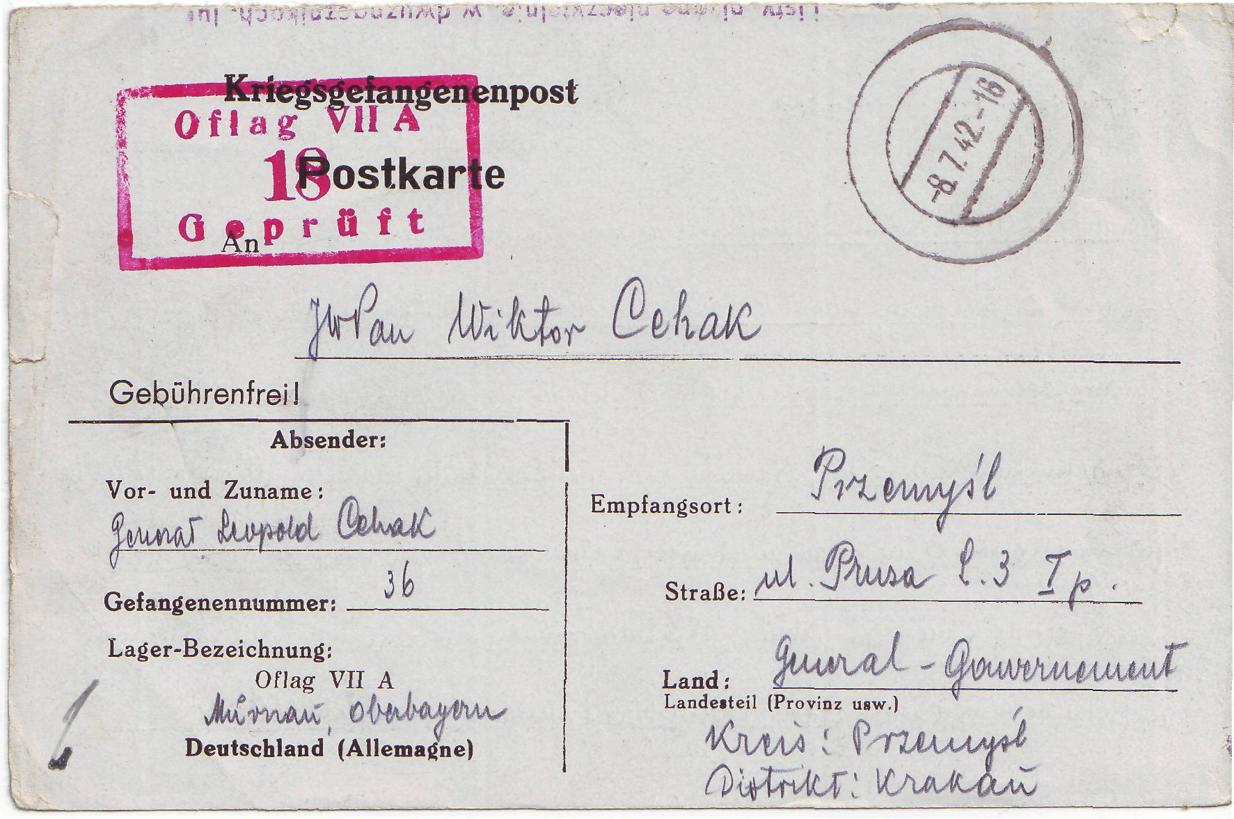 List generala Leopolda Cehaka z Oflagu VII A Murnau z dnia 8 VII 1942 roku do Wiktora Cehaka